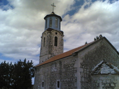 Poplat, Berkovici, Hercegovina